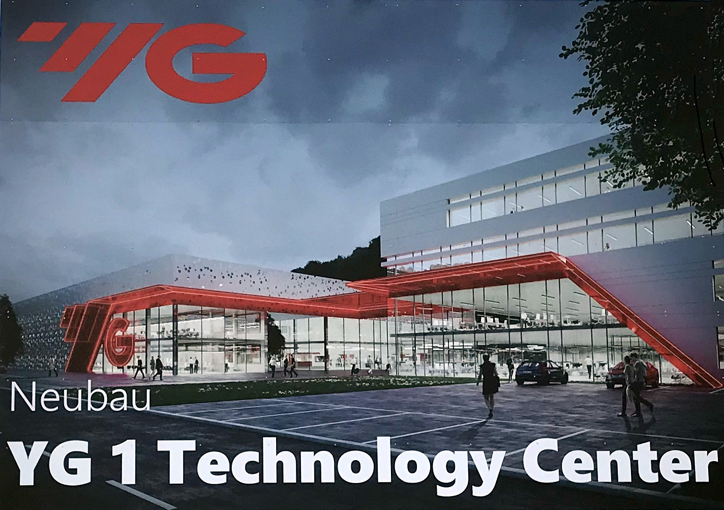 Oberkochen: Bauschild für das neue Technology Center von YG-1 im Industriegebiet „Oberkochen Süd II“ („Am Märzenbuckel“)